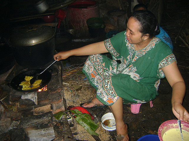 Menggorang tempe mendoan di dapur